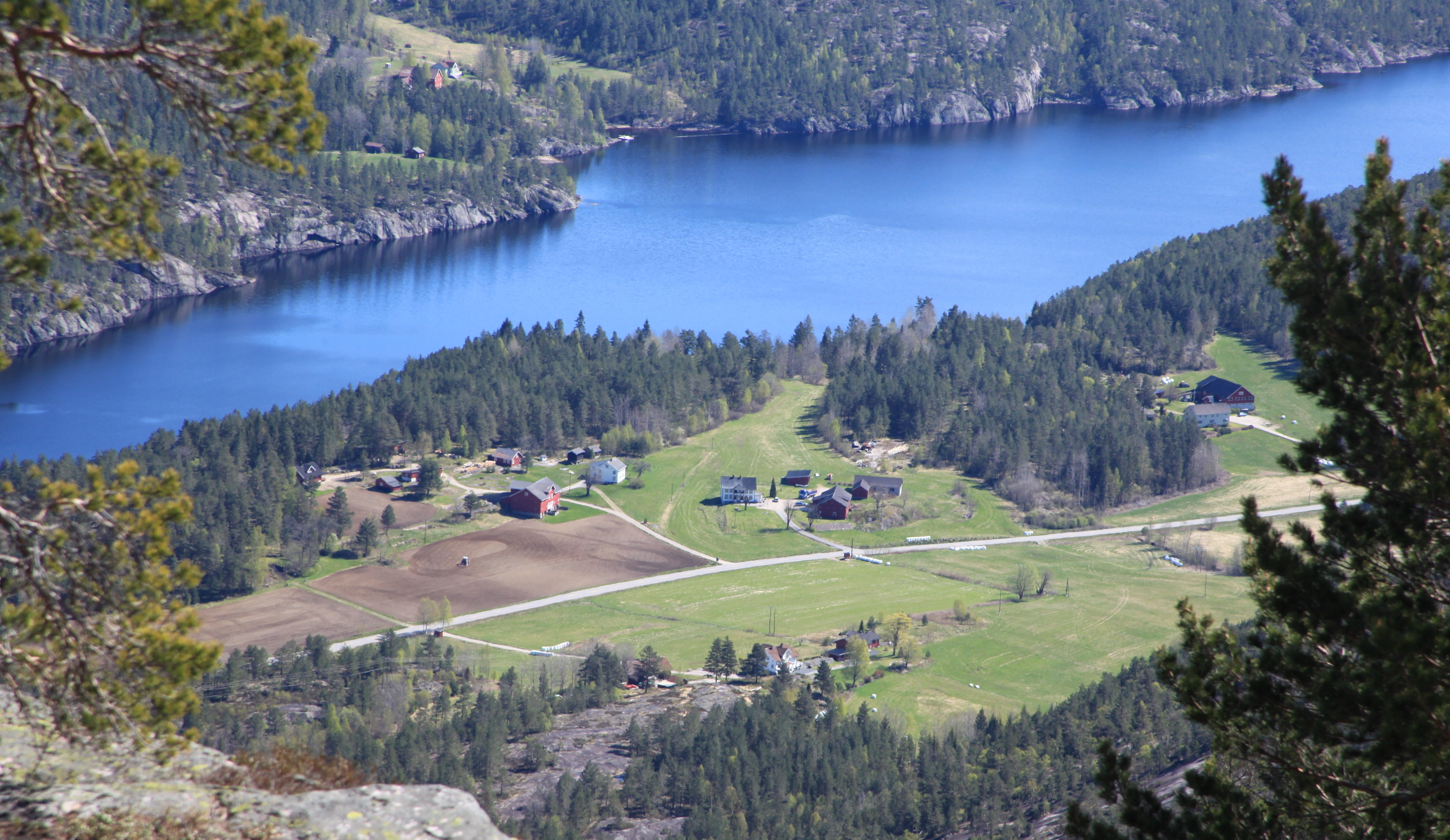 Vrålstad i Telemark.